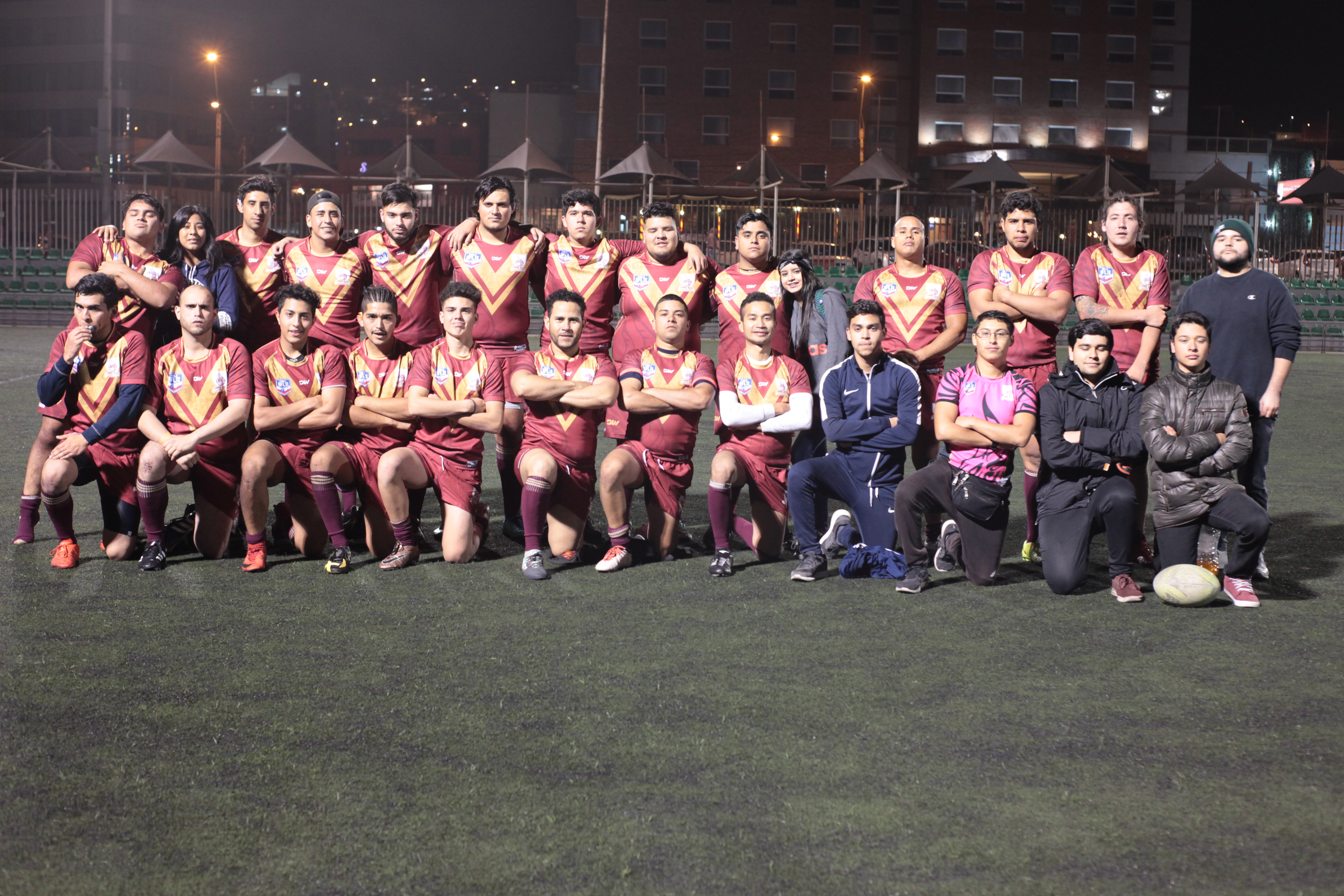 Foto del Equipo campeón del primer titulo del Club, Torneo Clausura 2018.